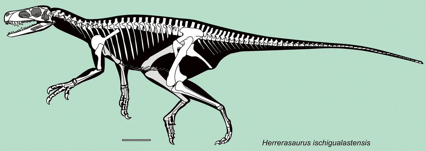 Herrerasaurus ischigualastensis.